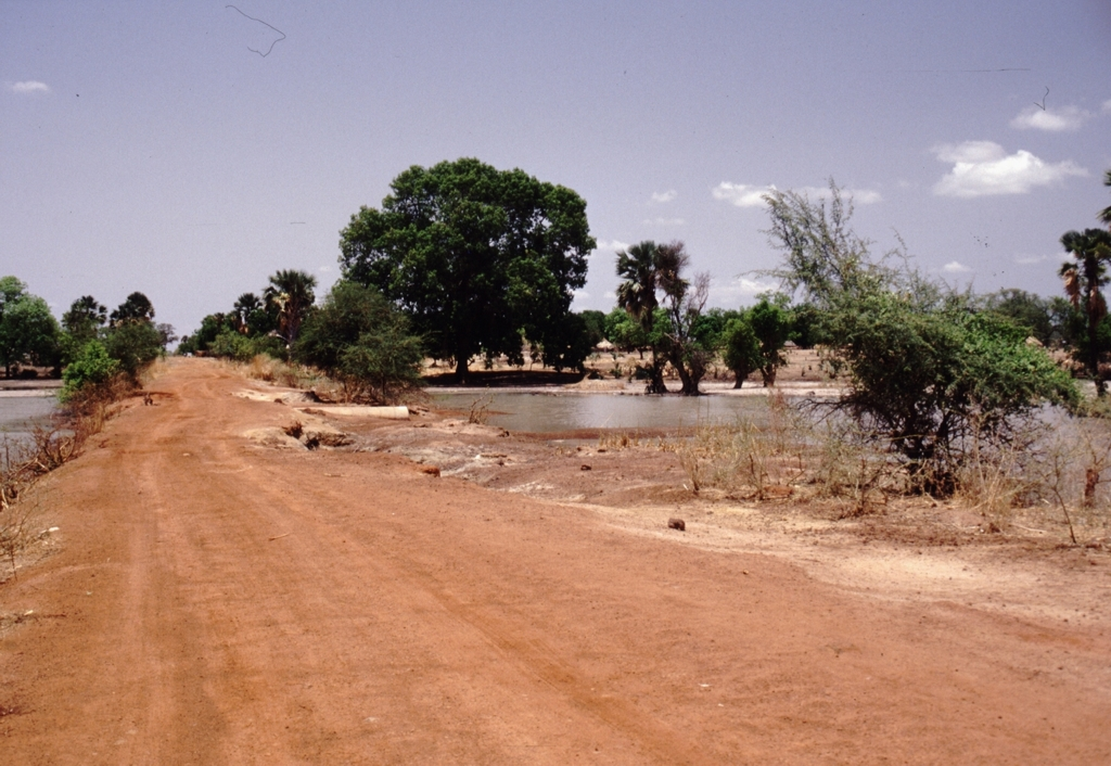 Die Northbank zwischen Janjanbureh (Georgetown) und Barra, dies ist die einzige Ost – West Verbindung am Nordufer des Gambia River, andere „Straßen“ gibt es nicht. Bild der Nähe von Njau direkt an der Grenze zum Senegal aufgenommen